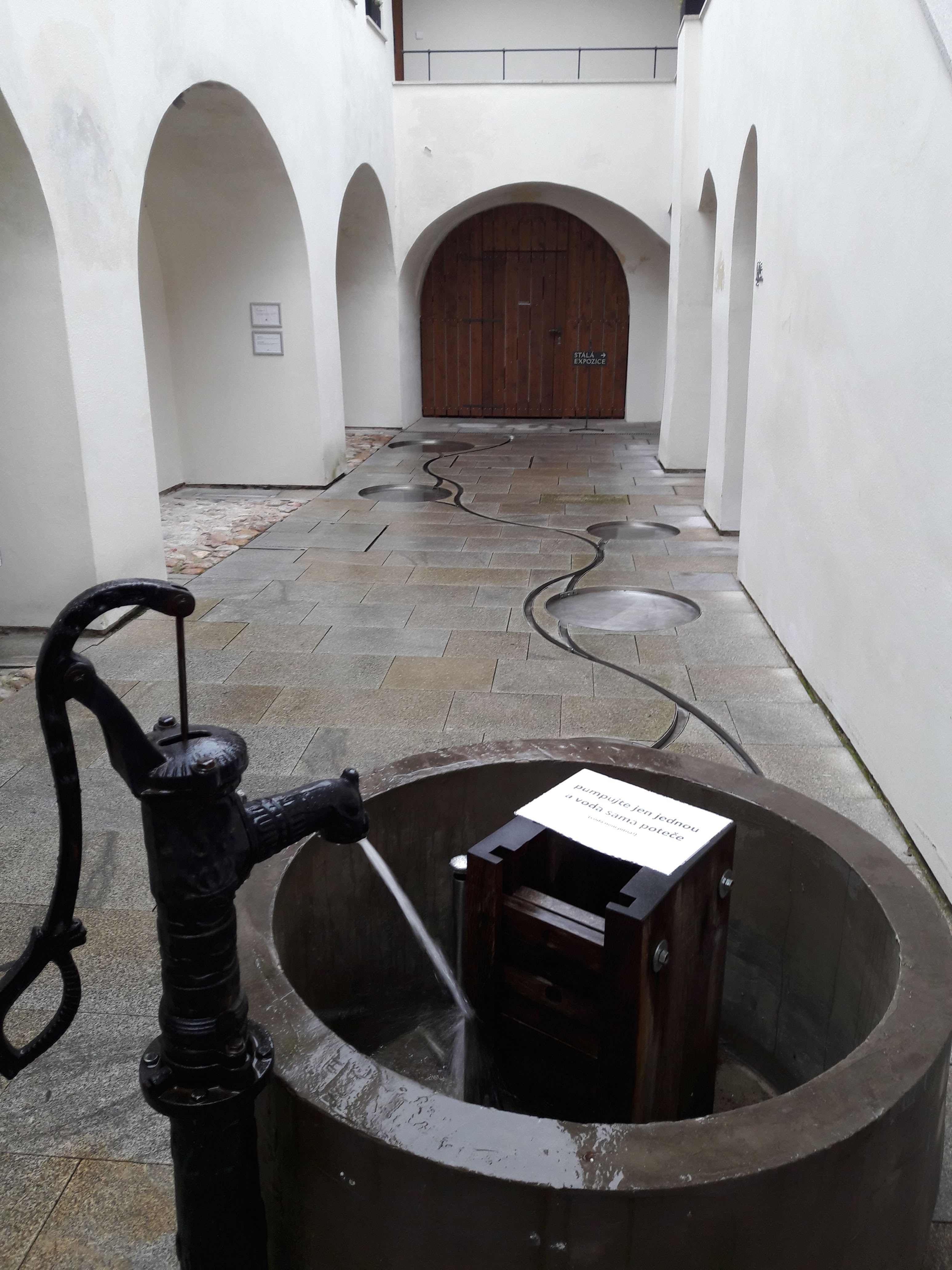 Interaktivní vodní model v Domě Štěpánka Netolického. Představuje Zlatou stoku a související rybniční soustavu.